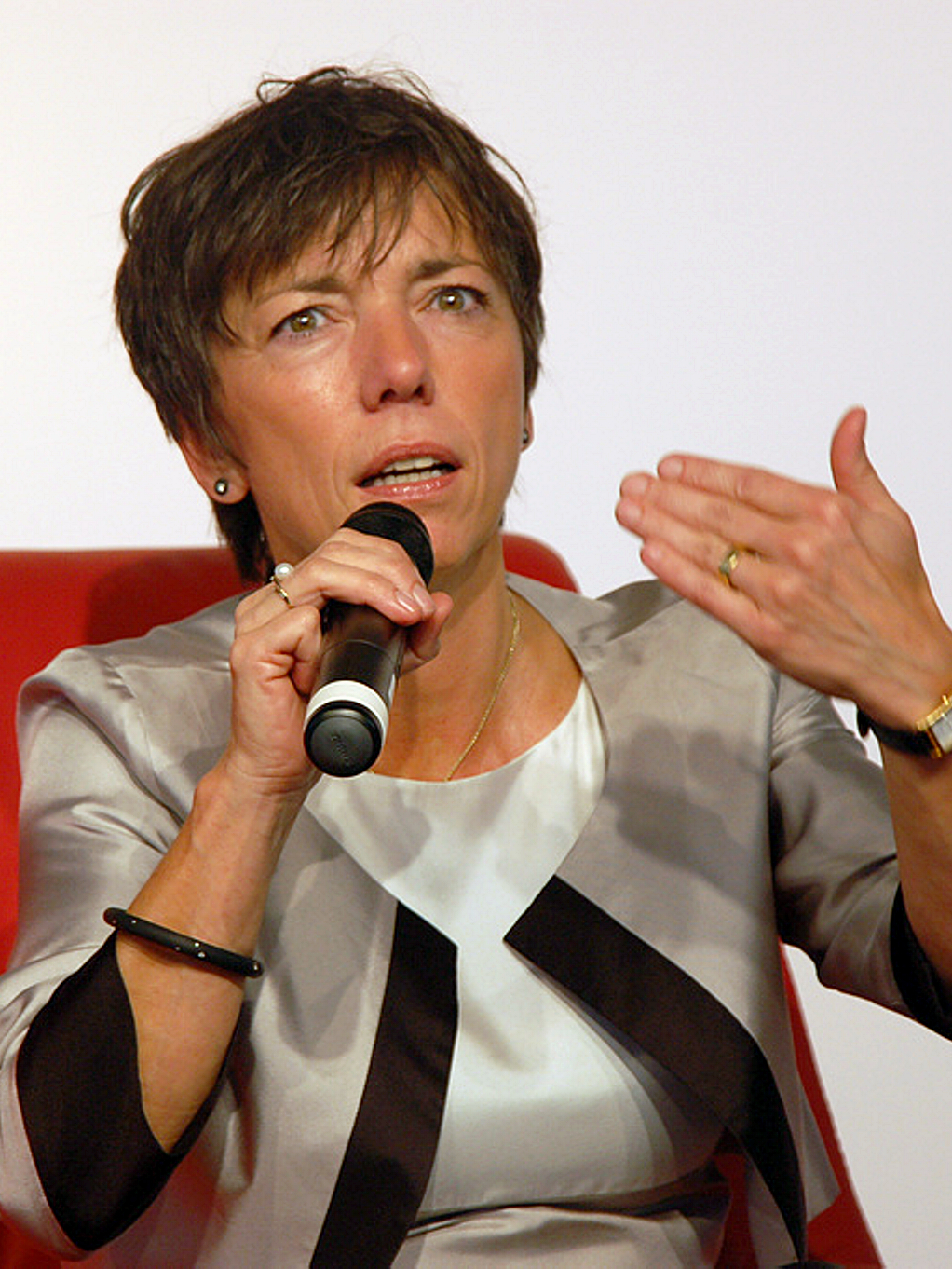 Bischöfin Margot Käßmann bei einer Podiumsdiskussion beim Deutschen Evangelischen Kirchentag 2009 in Bremen, Deutschland.